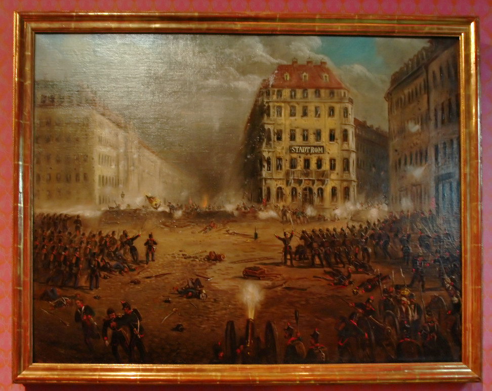 Truppen (Sächsische und Preußische) am Dresdner Neumarkt. Barrikaden der Aufständigen. „Hotel de Saxe“, Moritzstraße, „Hotel Stadt Rom“ (v.l.n.r).